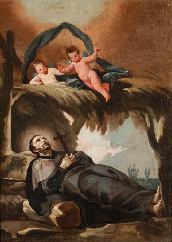 La obra representa la muerte del jesuita español San Francisco Javier (1506-1552).